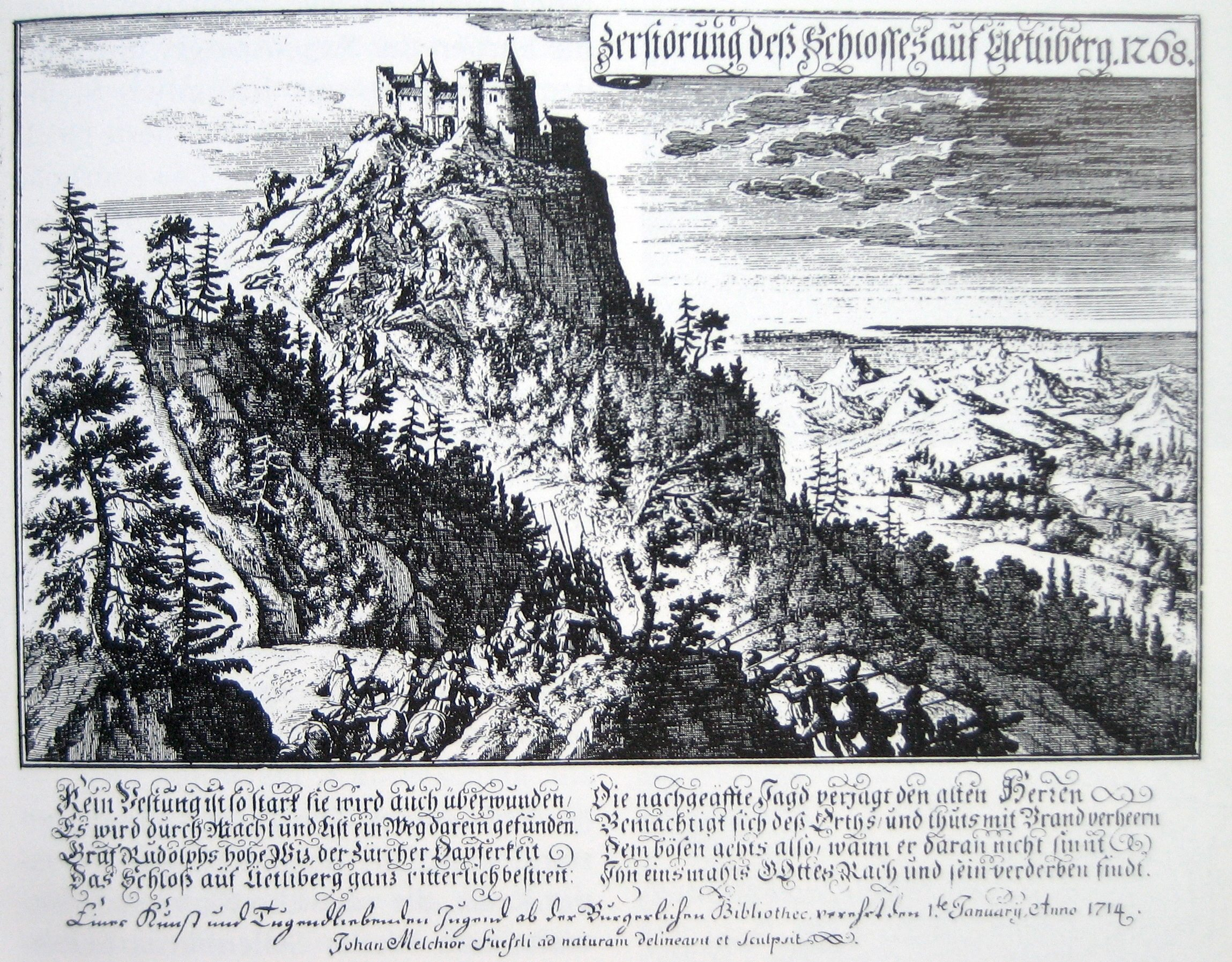 Die Zerstörung der Üetliburg 1268. Kupferstich herausgegeben von David Herrliberger